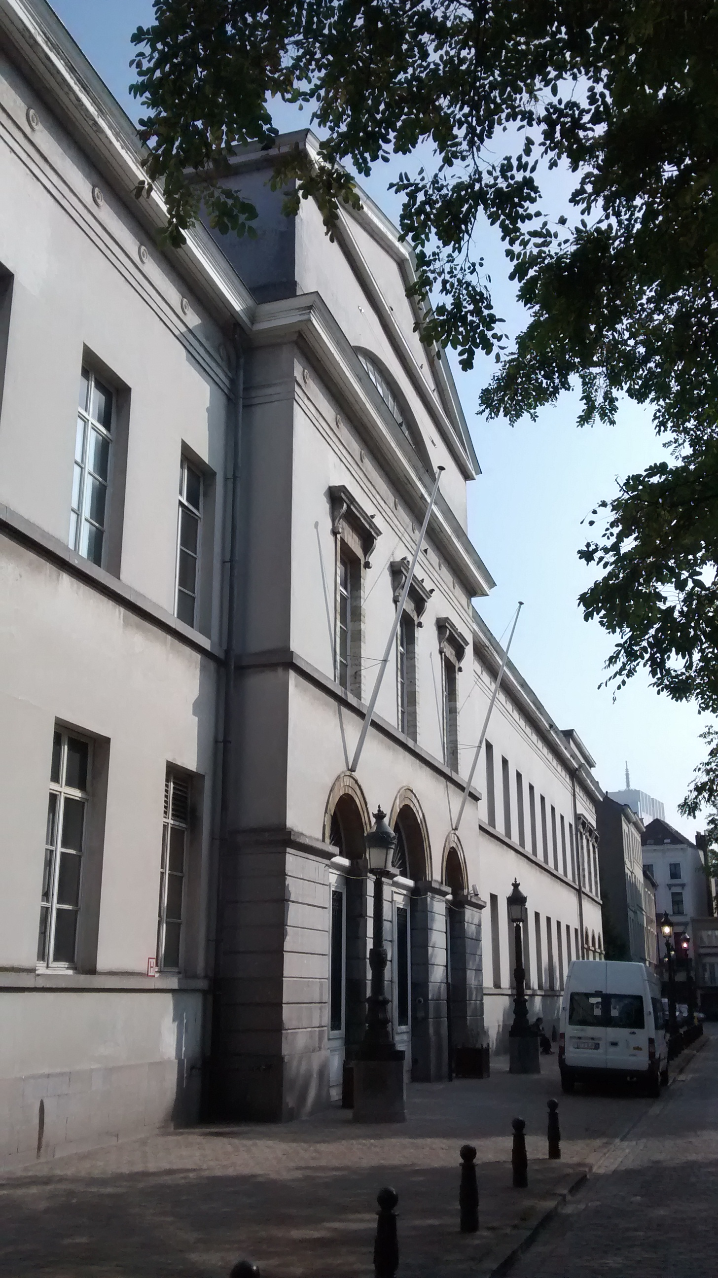 Groot Godshuis of Pacheco Tehuis